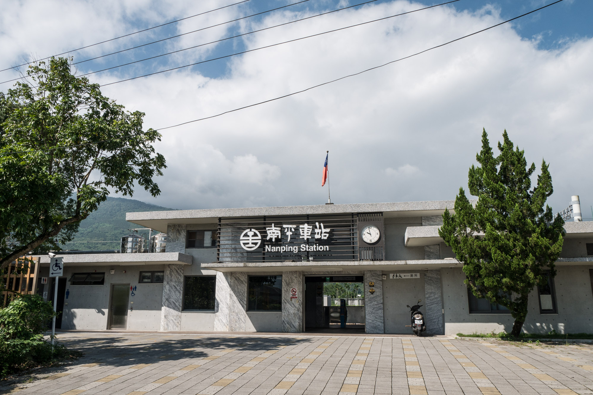 南平車站